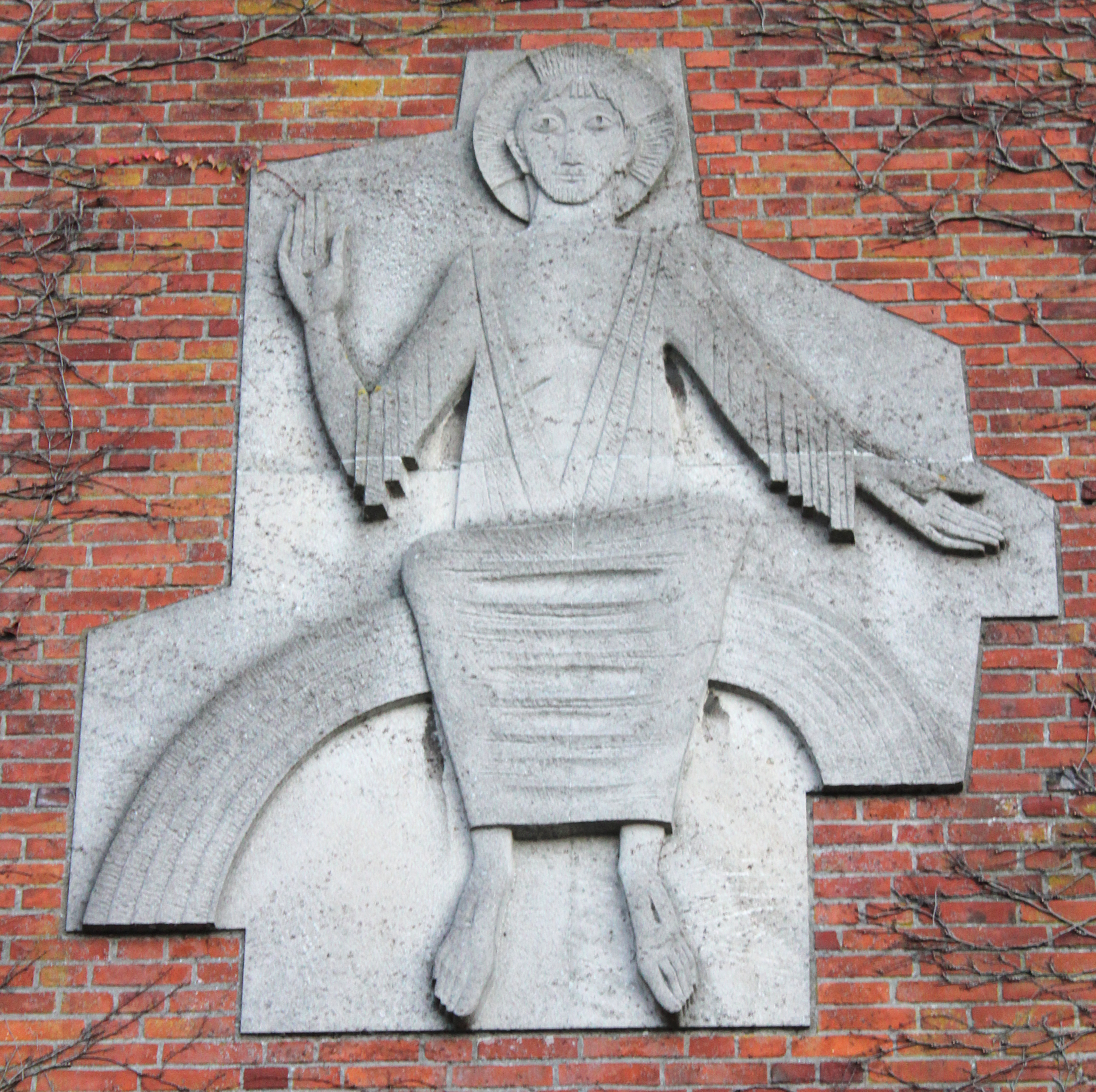 Relief von Christus als Weltenrichter an der Christuskirche Flensburg-Mürwik, Oktober 2011, Bild 02